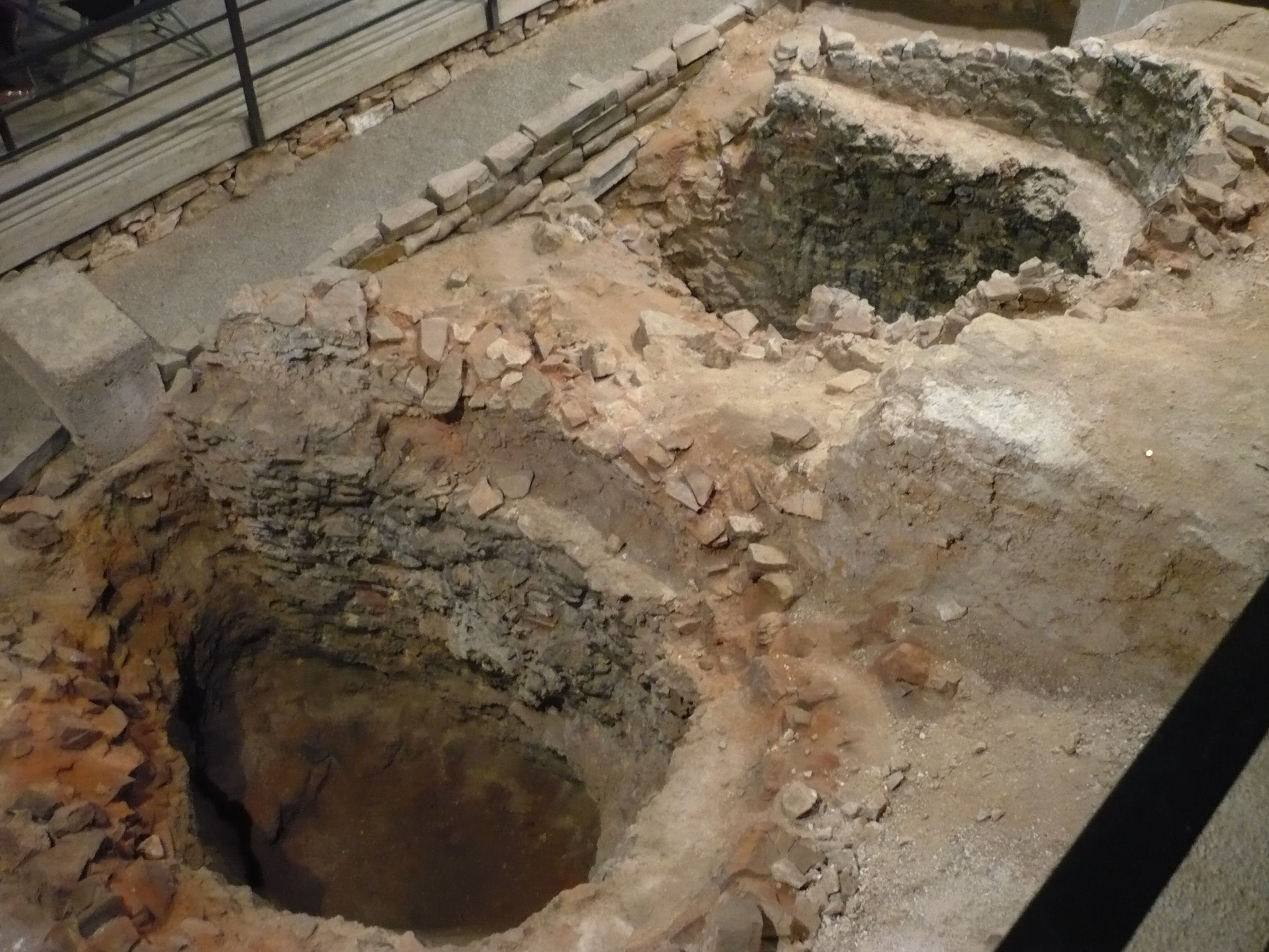 Römische Kalkbrennerei Iversheim - Zwei der drei Kalköfen im Schutzbau